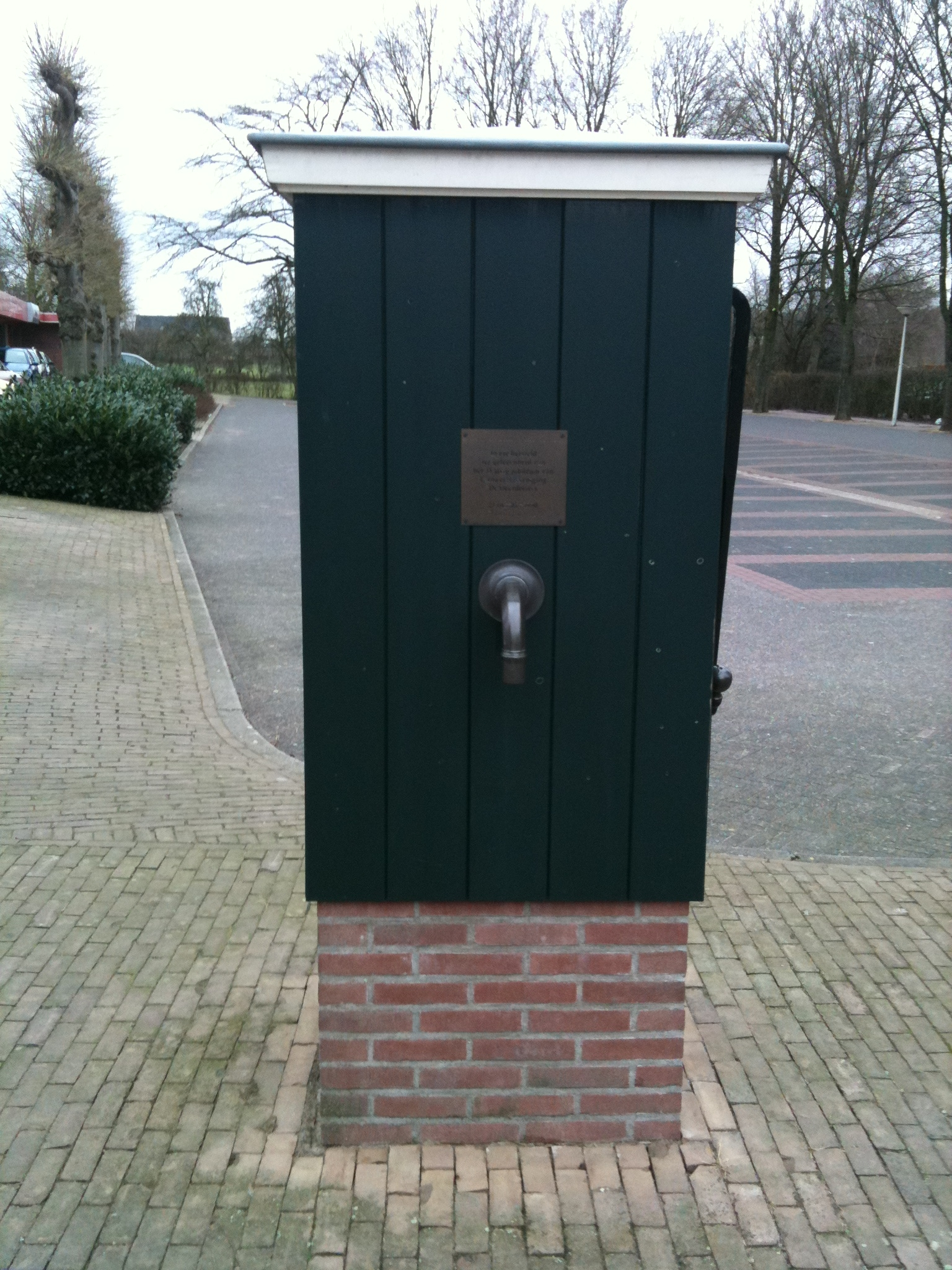 Dorpspomp Groessen, replica van de originele dorpspomp, onthuld op 27 oktober 1990